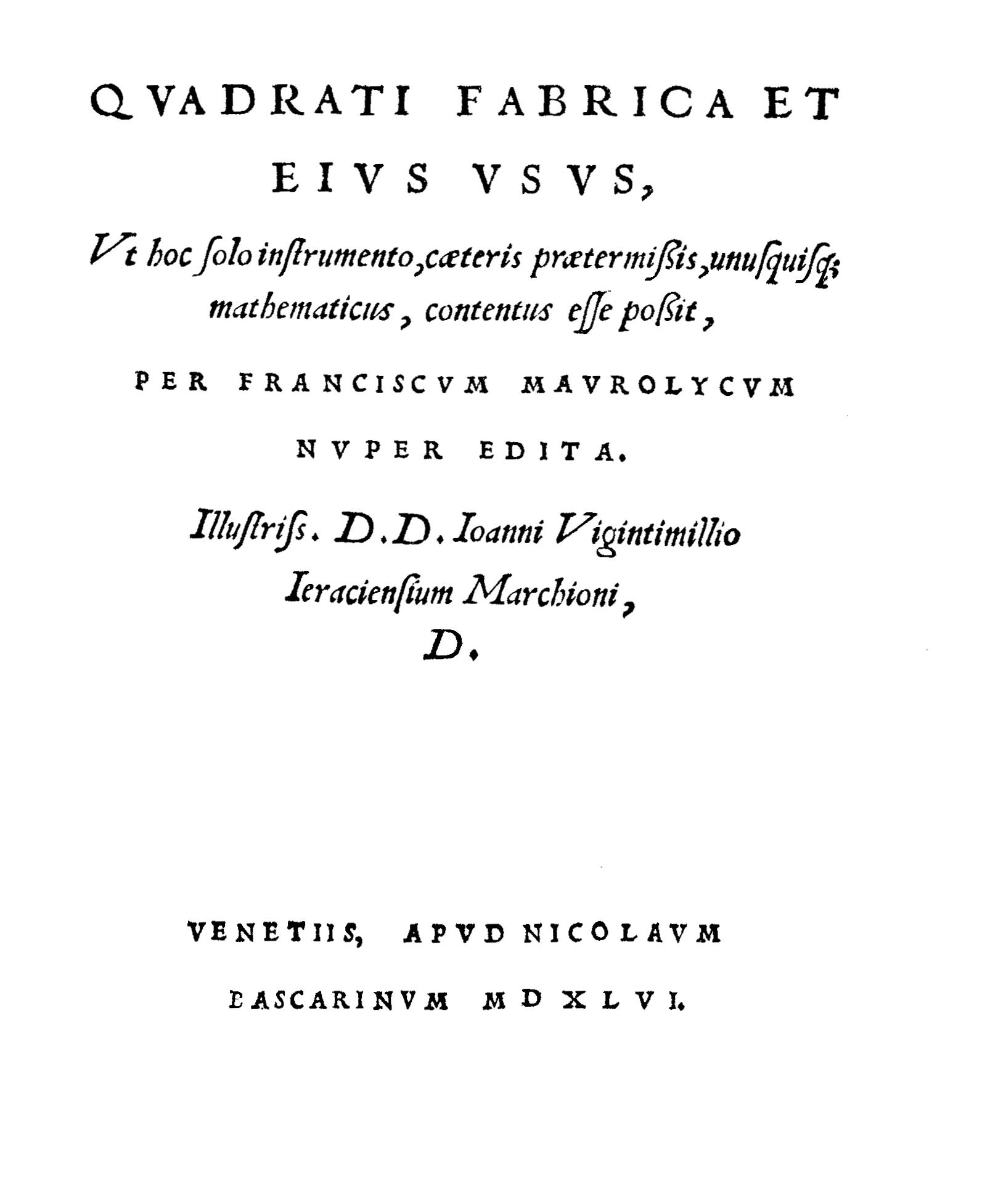 Quadrati fabrica et eius vsus, vt hoc solo instrumento, caeteris praetermissis, unusquisque mathematicus, contentus esse possit, per Franciscum Maurolycum nuper edita. .... - Venetiis : apud Nicolaum Bascarinum, 1546. - 11, [1] c. : ill. ; 4º .